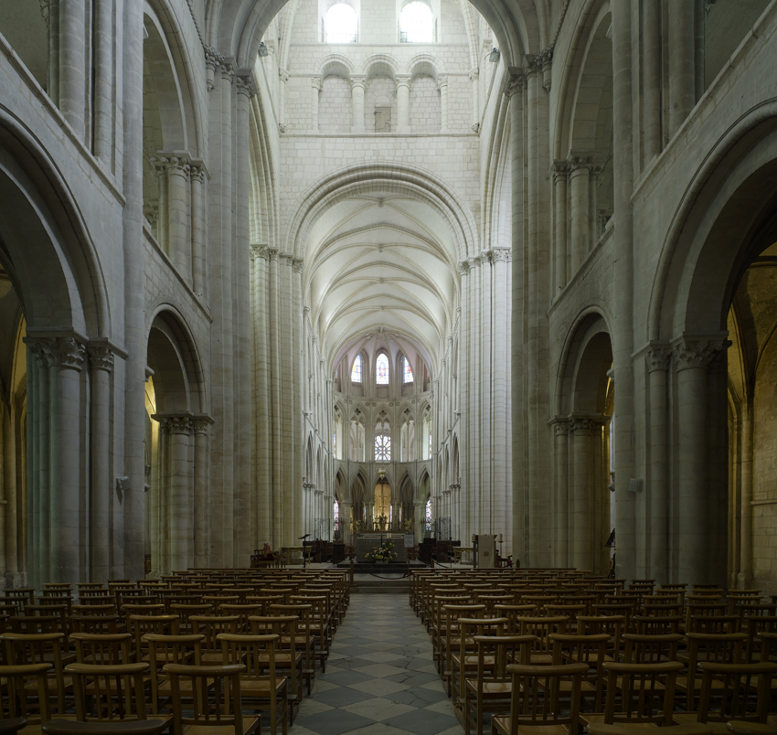 This building is en partie classé, en partie inscrit au titre des Monuments Historiques. .